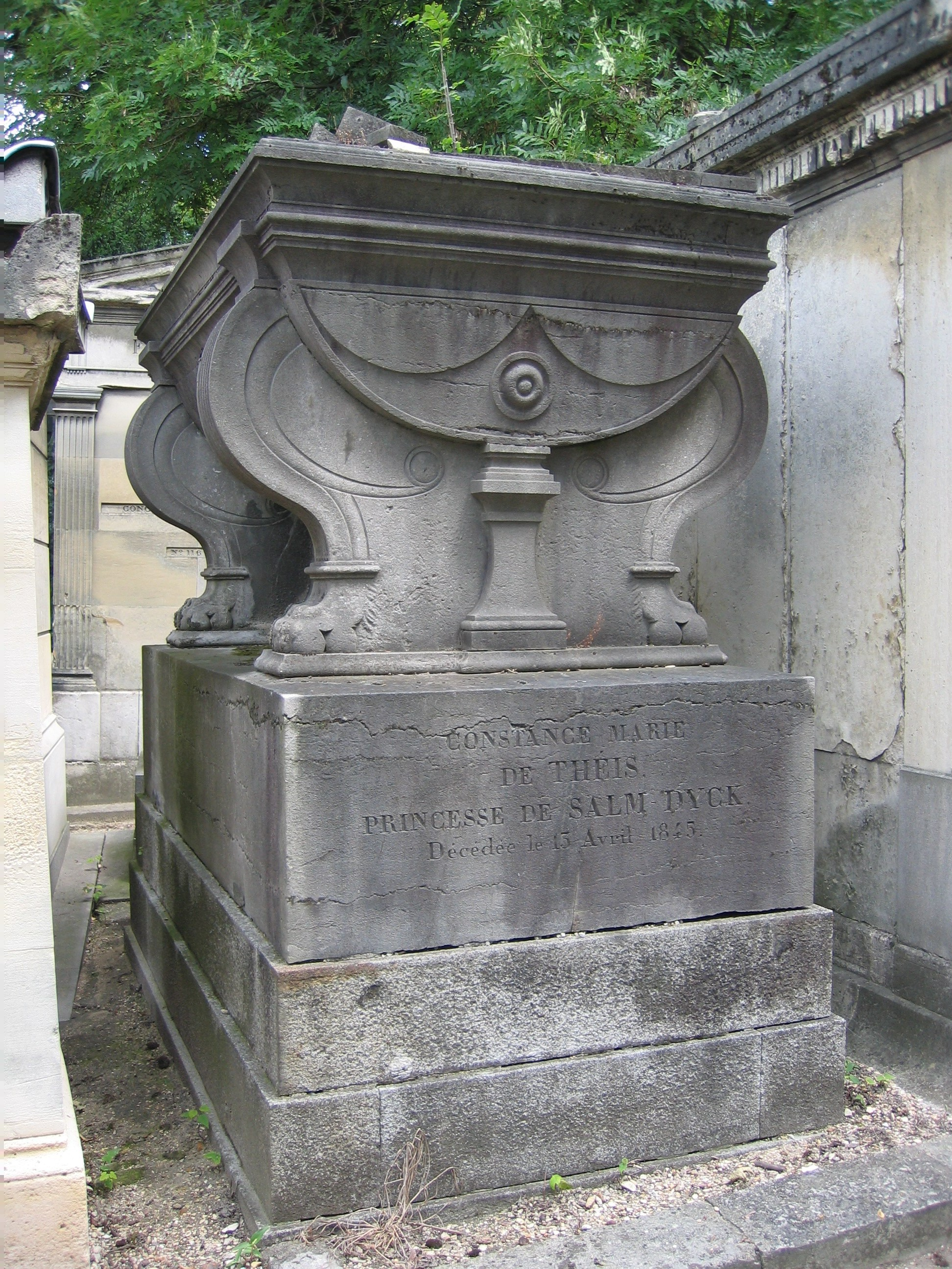 Tombeau de Constance de Théis, princesse de Salm-Dyck (1767-1845), cimetière parisien du Père-Lachaise (26e division, chemin Monvoisin)